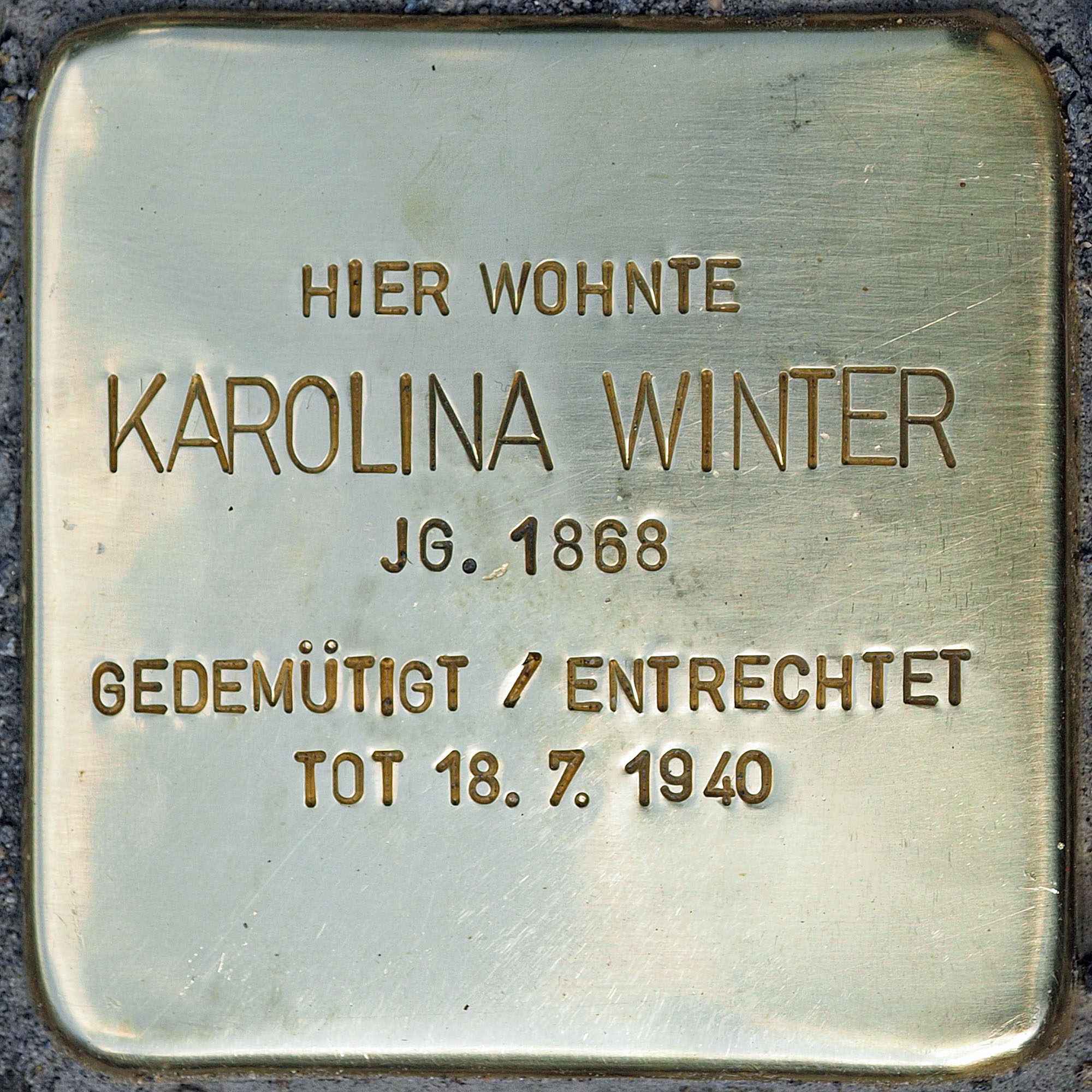 Stolpersteine Kempen: Winter, Karolina